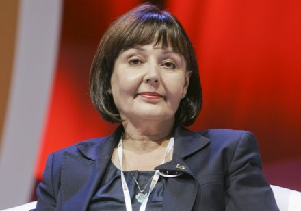 minister pracy w rządzie Donalda Tuska